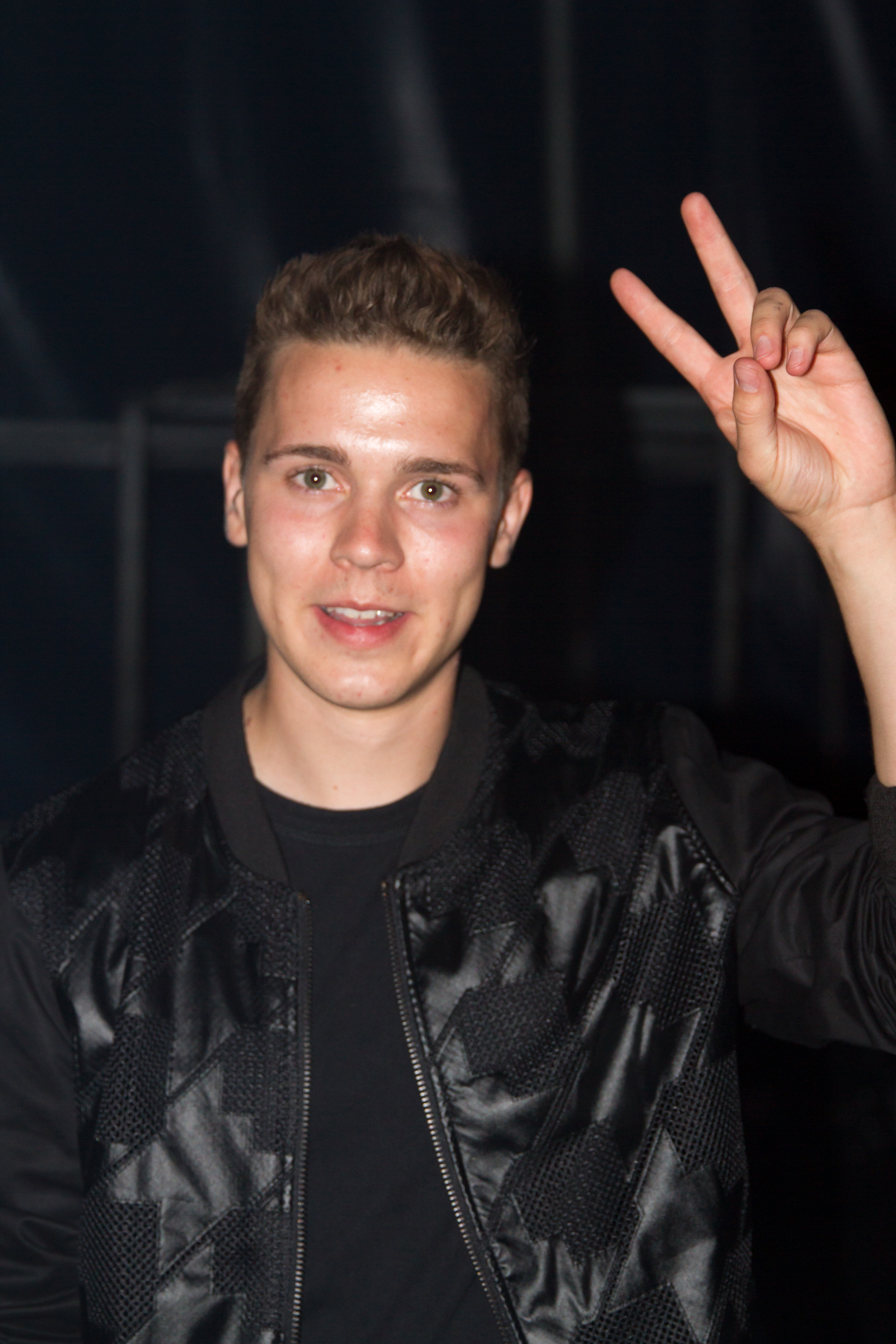 Felix Jaehn beim 14. Airbeat-One Dance Festivals das vom 16. bis 19. Juli 2015 auf dem Flugplatz Neustadt-Glewe.